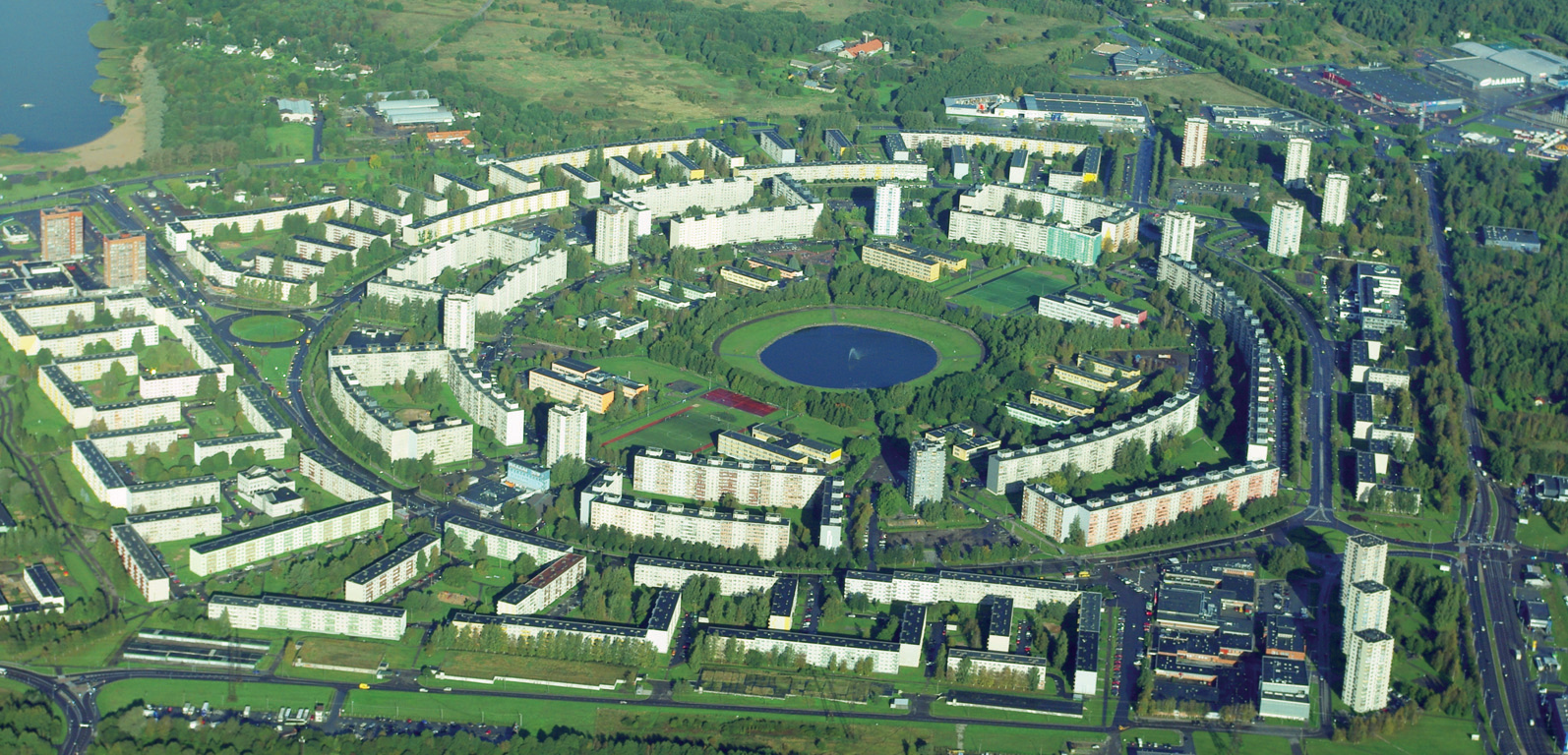 Õhuvaade Väike-Õismäe asumile